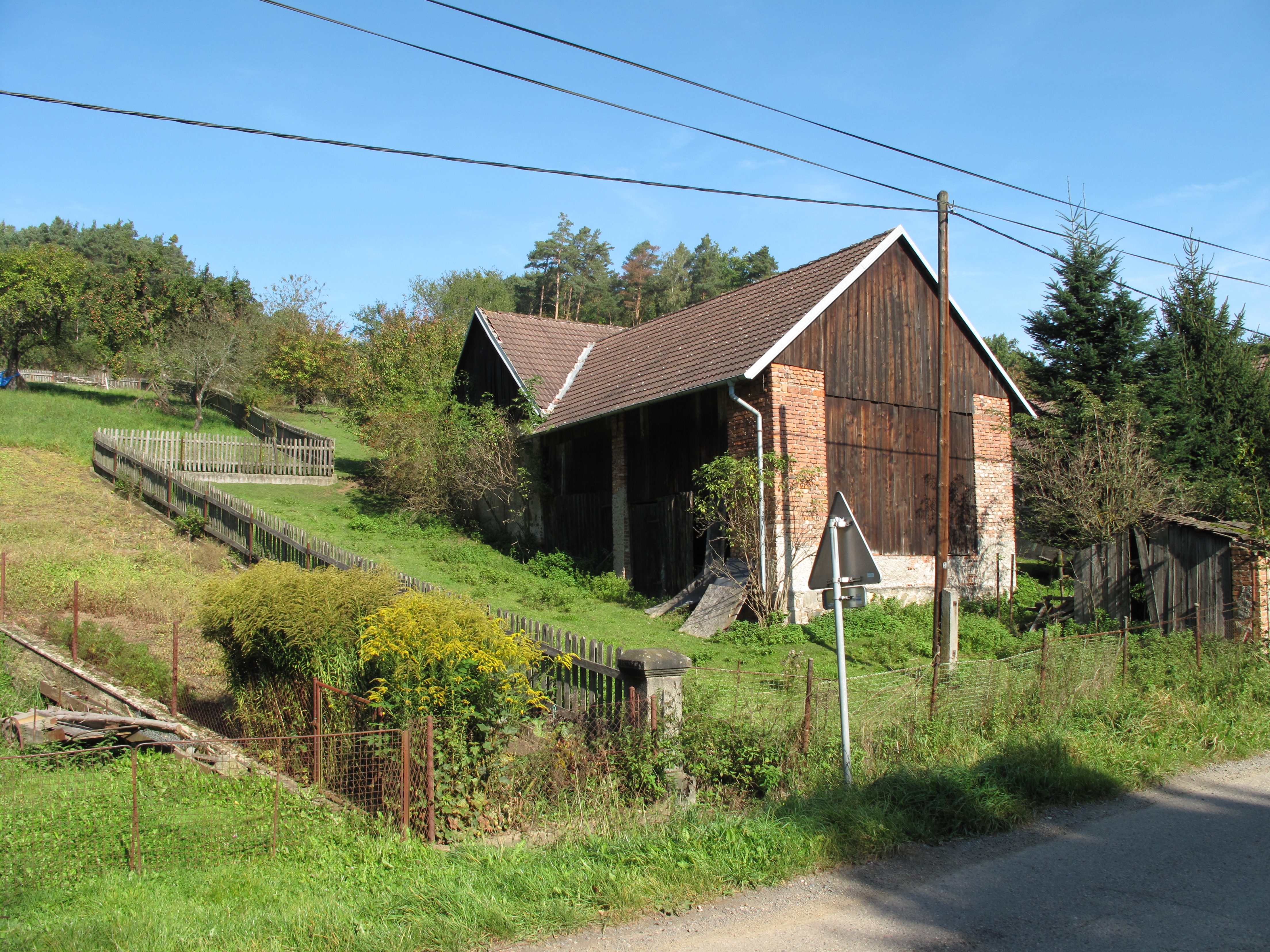 Soběšovice, okres Benešov, Česká republika. Stodola u čp. 12.